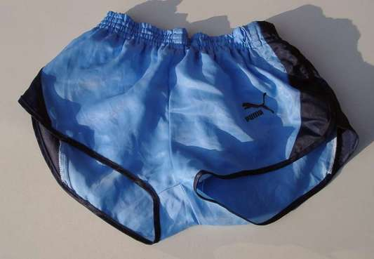 Sprinterhose der 70er Jahre (von mir fotografier public domain)